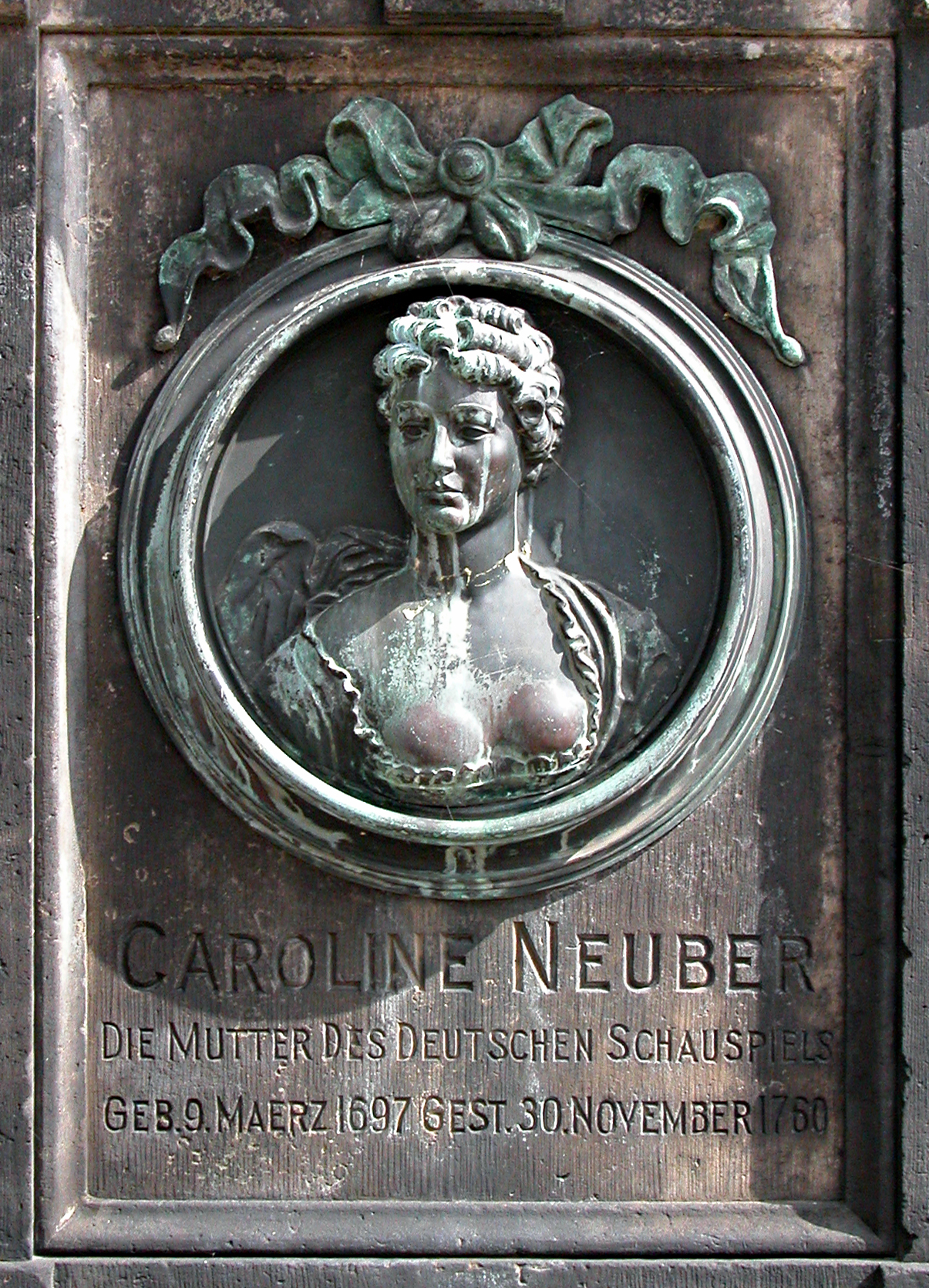 11.04.2006 01279 Dresden-Laubegast, Fährstraße / Ecke Laubegaster Ufer Denkmal für Friederike Caroline Neuber (09.03.1697 - 30.11.1760), genannt die Neuberin, Mutter des deutschen Schauspiels. 1730 trat sie erstmals in Dresden auf. 16 Jahre nach ihrem Tod (also 1776) ließ die Gemeinde Laubegast aus Spenden von Kunstfreunden und Verehrern der Muse ein Denkmal aus Sandstein erbauen. Entworfen hat es Johann Christian Feige d.J. und Friedrich August Krubsacius. Das Bildnismedaillon ist aus Bronze. (GMP: 51.024532,13.840155). [DSCN9413.TIF]20060411045.JPG(c)Blobelt